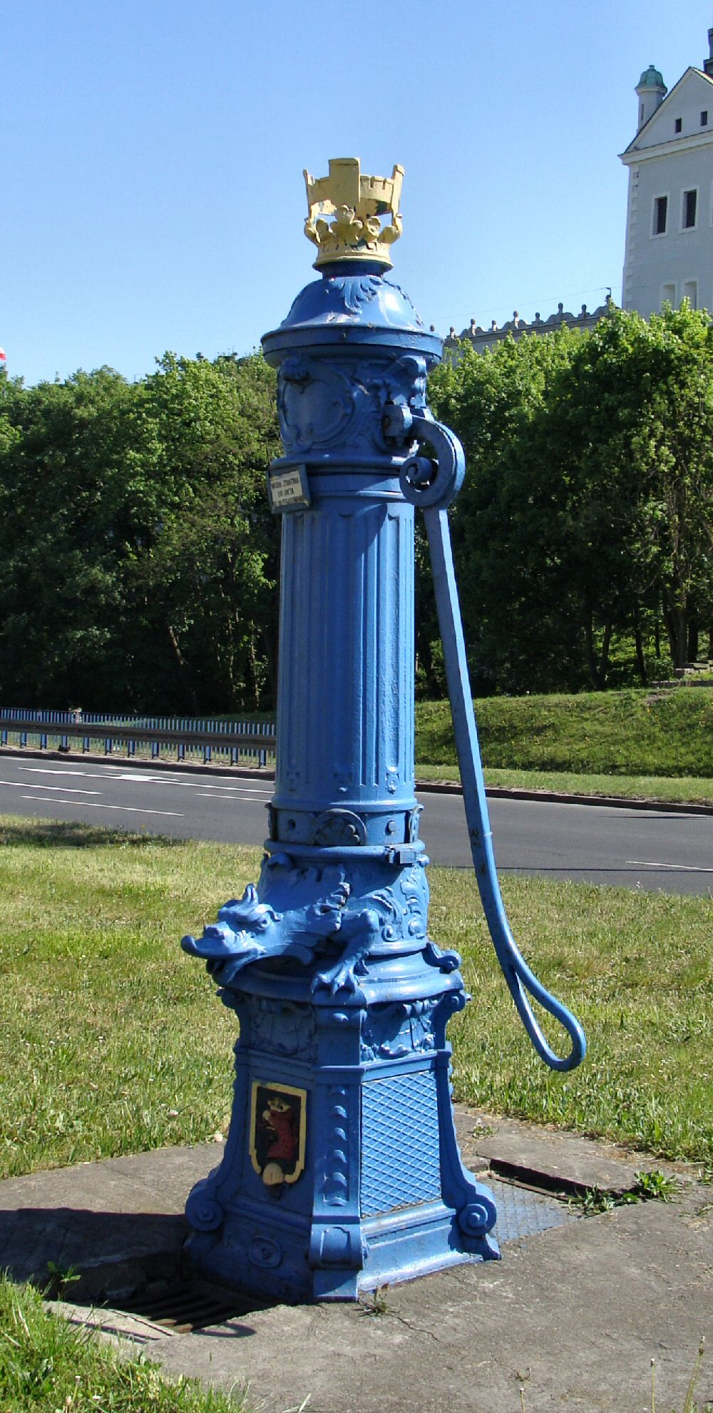 Pompa uliczna przy Trasie Zamkowej w Szczecinie